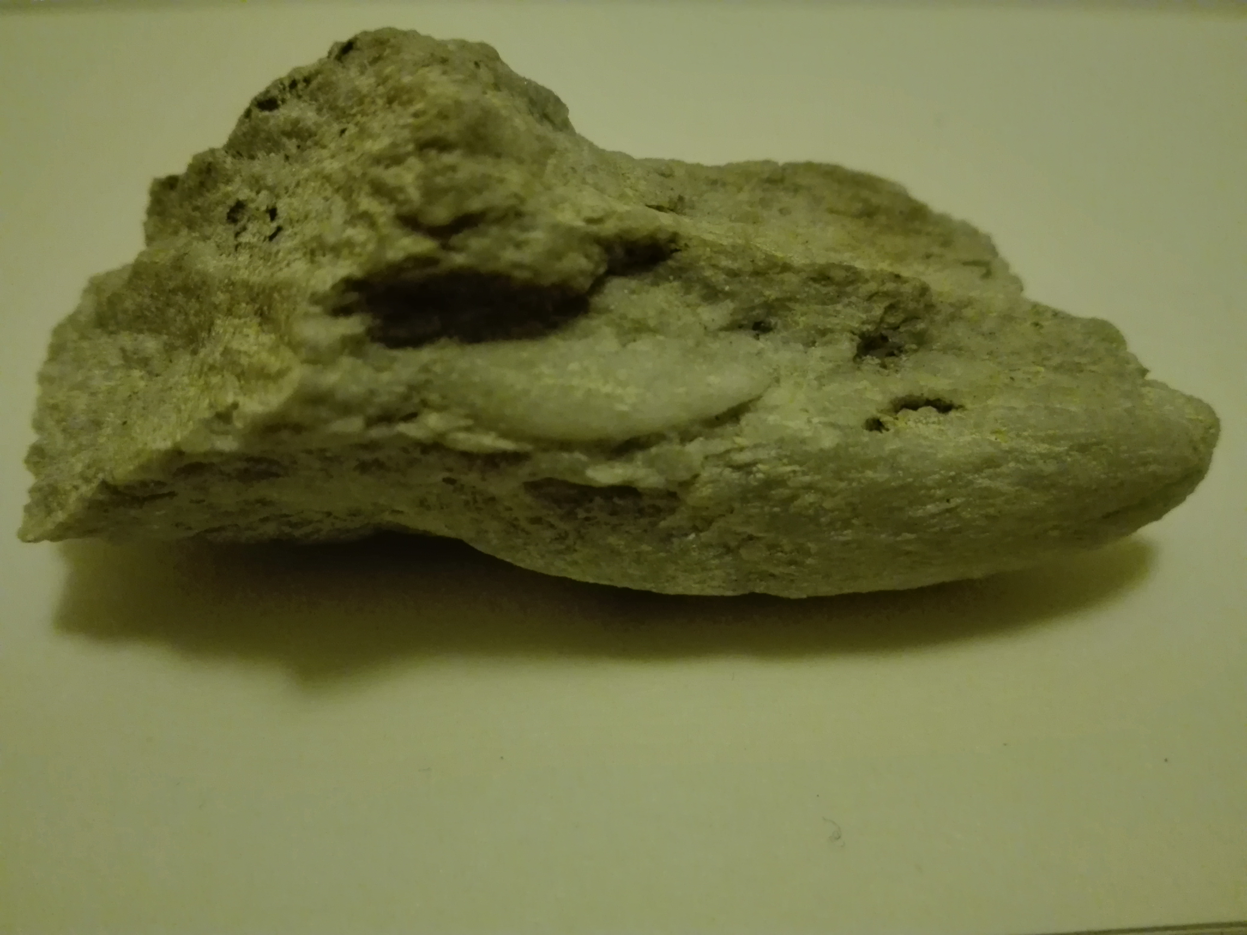 Próbka kwarcytu daktylowego ze Skałki Goethego